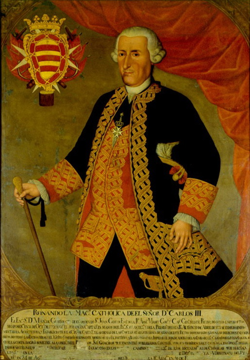 Titulo equivocado: Don Pedro Mesía de la Cerda, 5º Marqués de la Vega de Armijo, teniente general de la Real Armada y 5º virrey de Nueva Granada, héroe del 'Glorioso'.